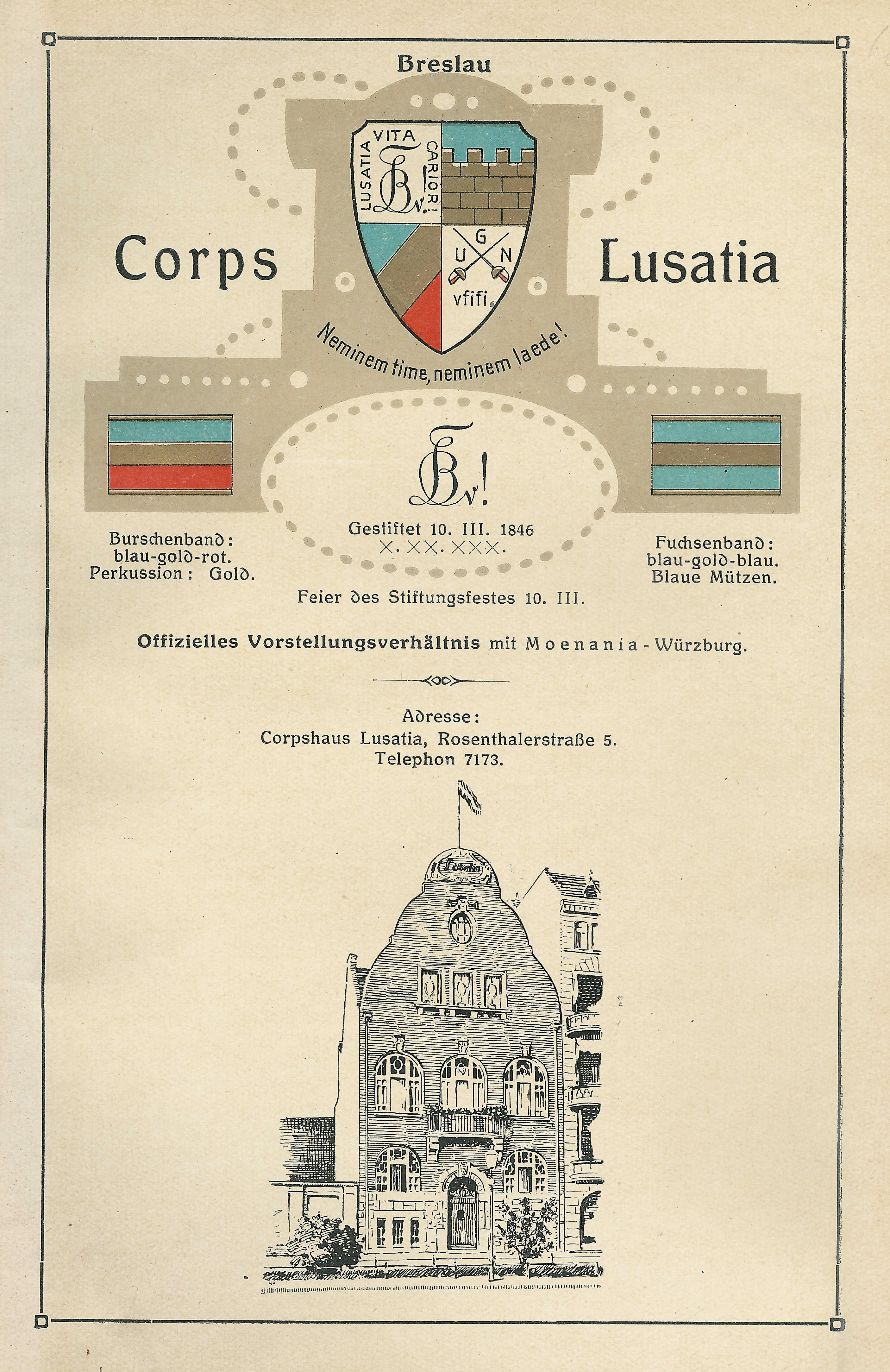 Couleur, Wappen, Zirkel und Corpshaus der Lusatia Breslau